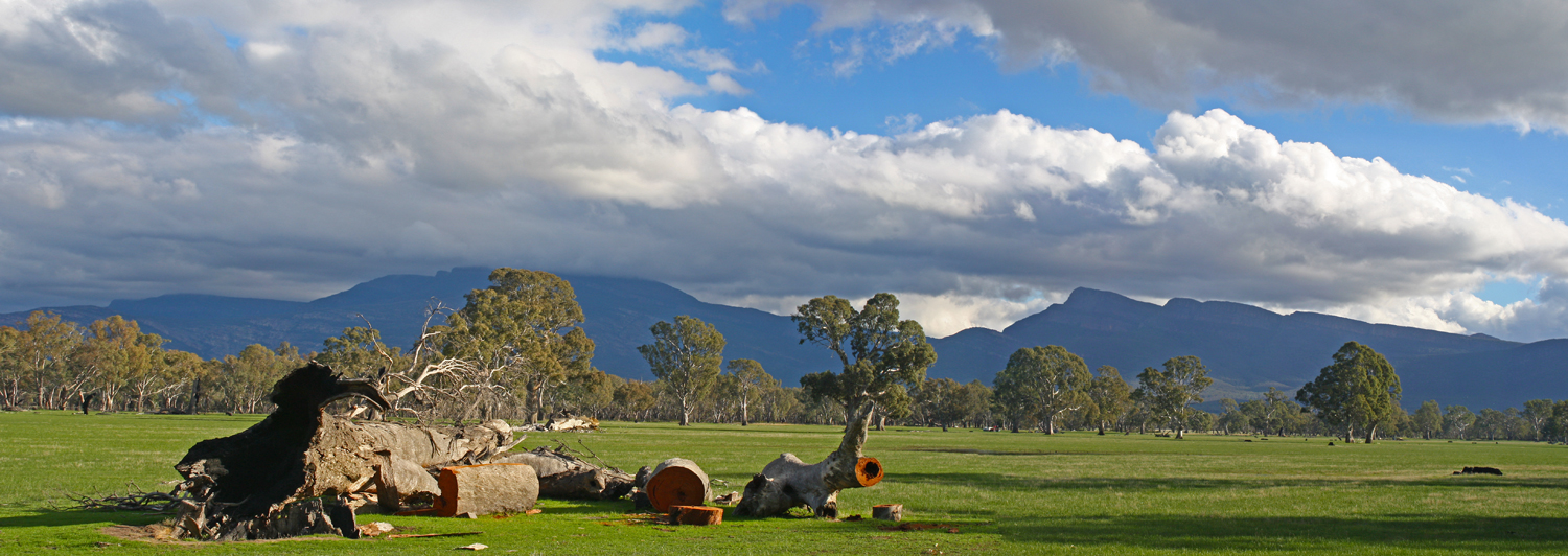 Landschaft im Bundesstaat Victoria, Australien